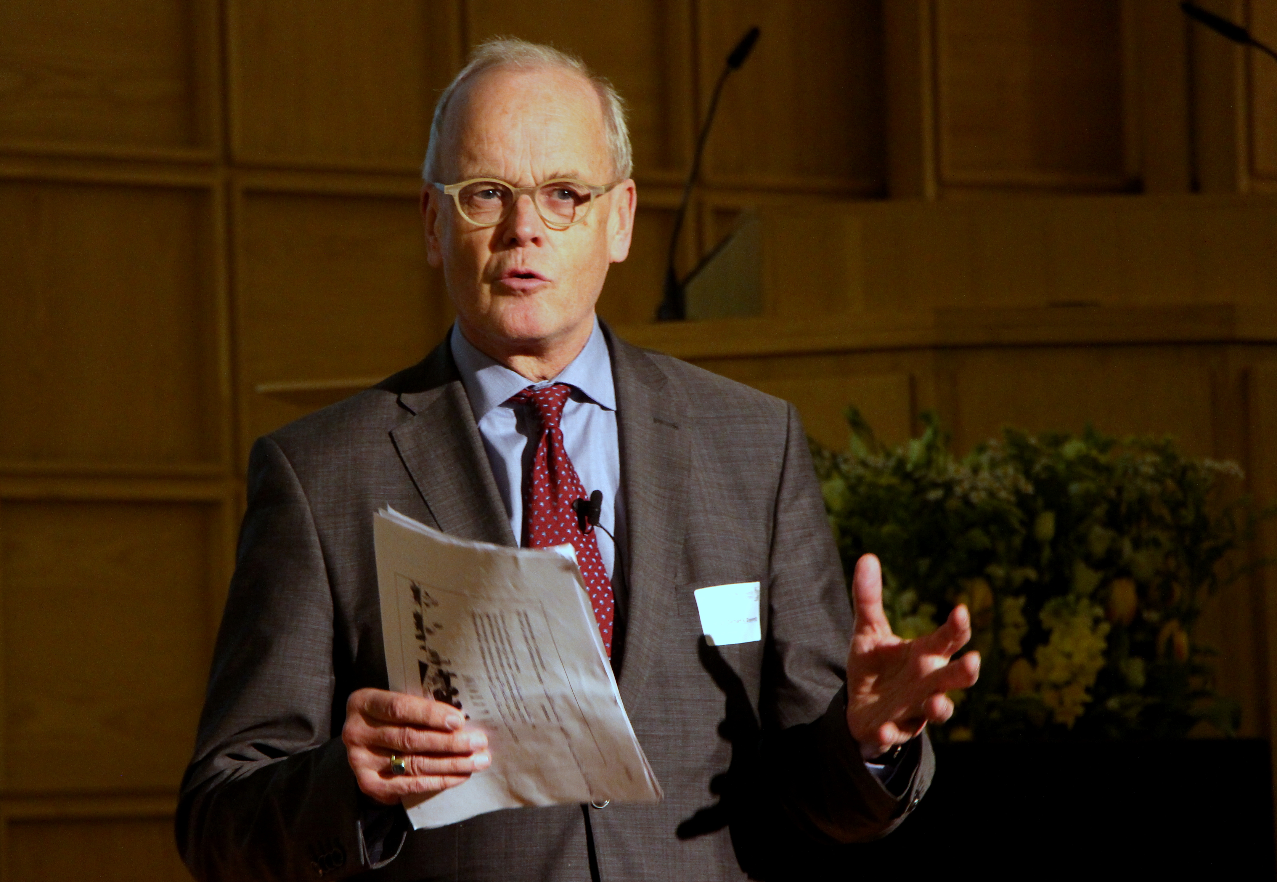 Wissenschaftsforum Universität Konstanz Gerda-Henkel-Stiftung 2015, Düsseldorf. Gerhart von Graevenitz, ehemaliger Rektor der Universität Konstanz